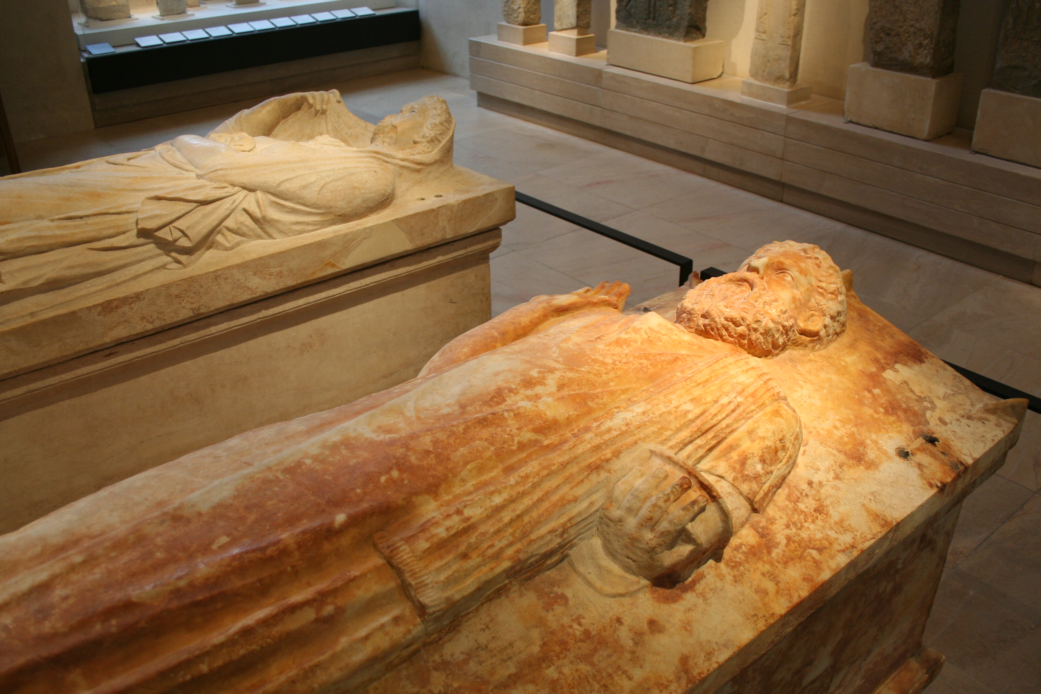 sarcophages anthropomorphes de Carthage, Musée du Louvre, département des antiquités